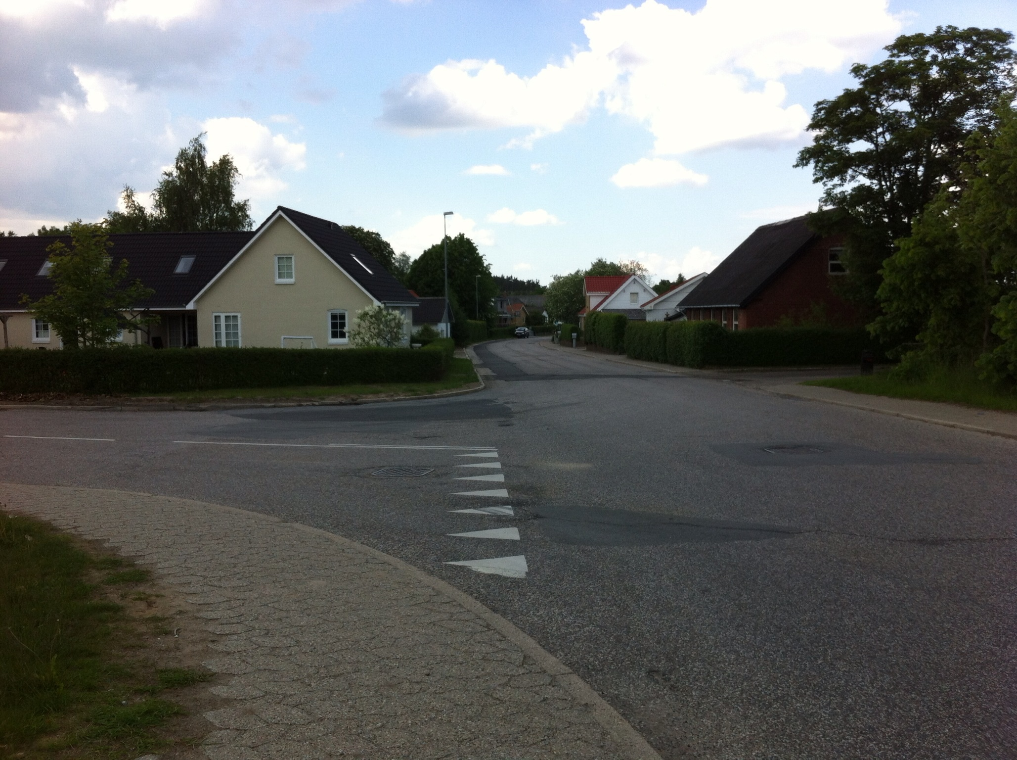 Søndergårde i Hadsund, set mod nord